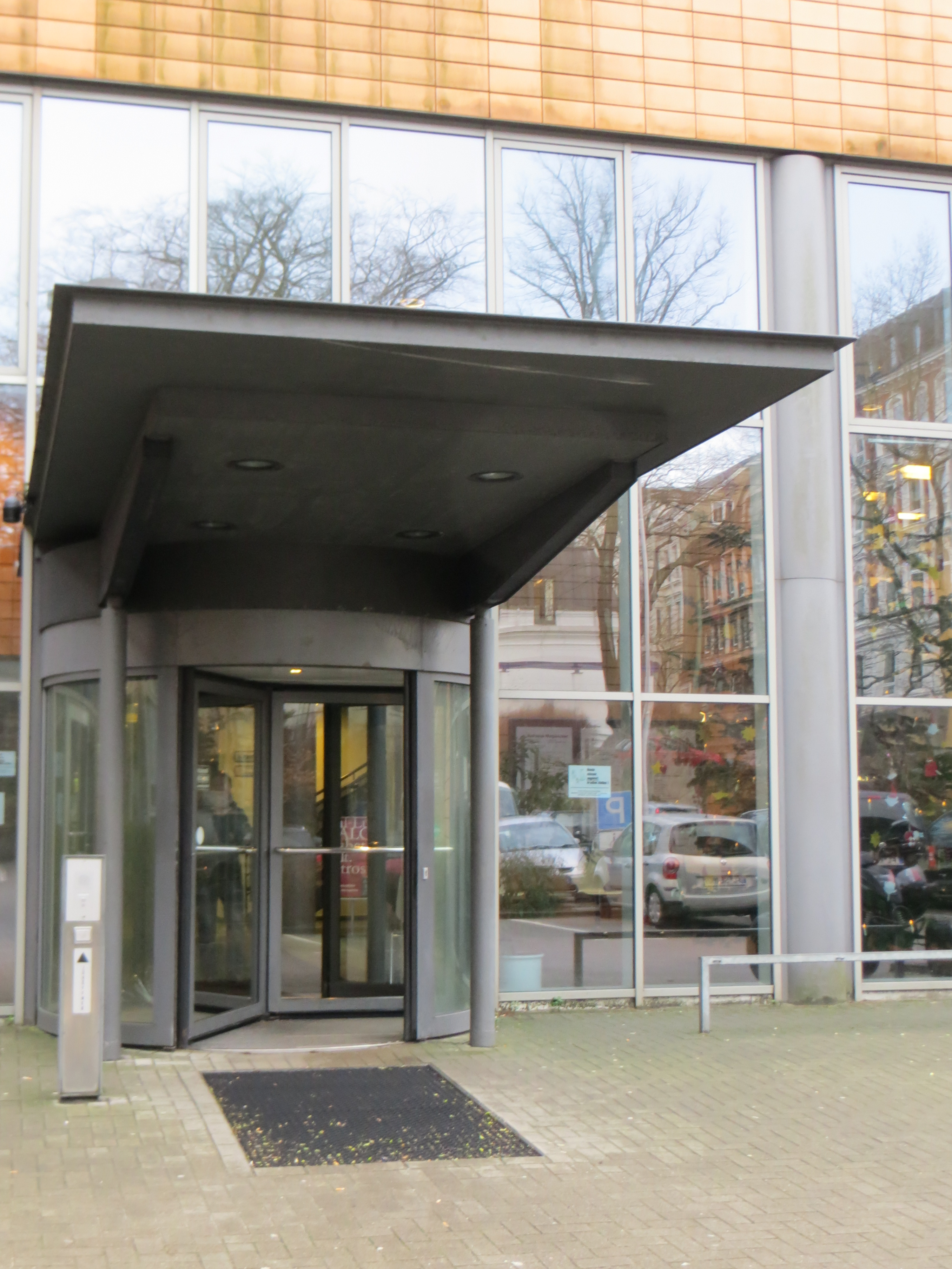 Eingang des Rathauses Flensburg, vom Pferdewasser aus, der Haupteingang